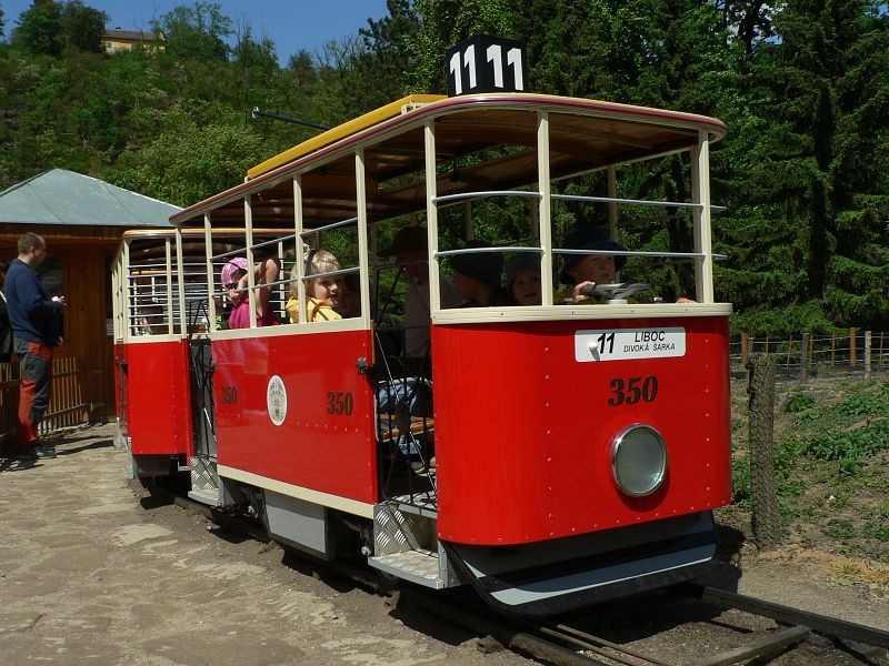 Tramvajová doprava v ZOO Praha